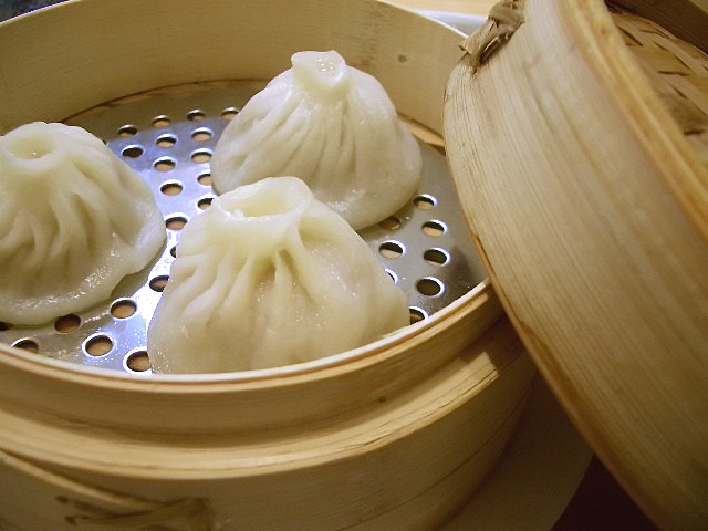 ジューシーで美味しかったです＾＾